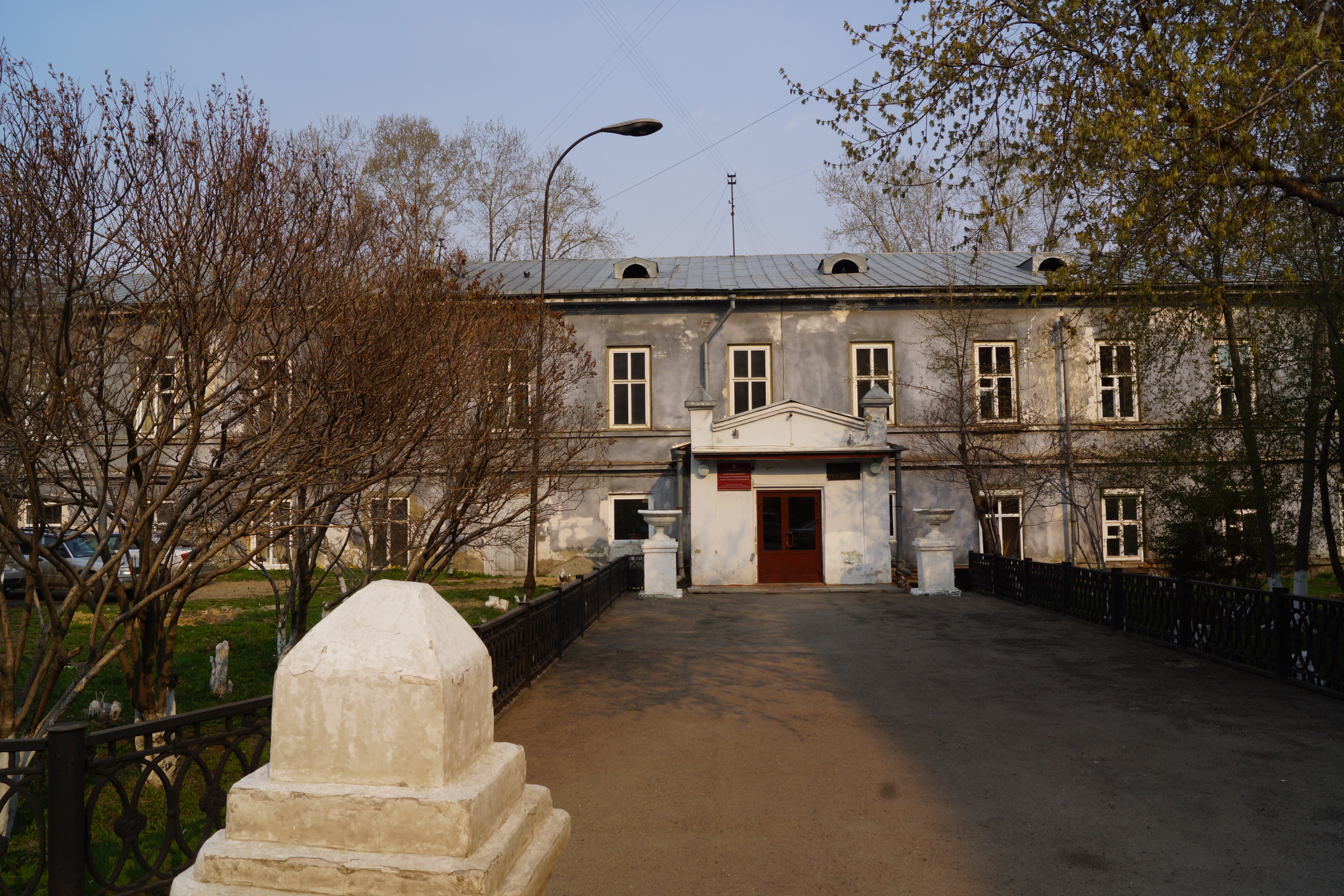 Здание духовной семинарии (Иркутская область, Иркутск, Красноказачья улица, 10-а)